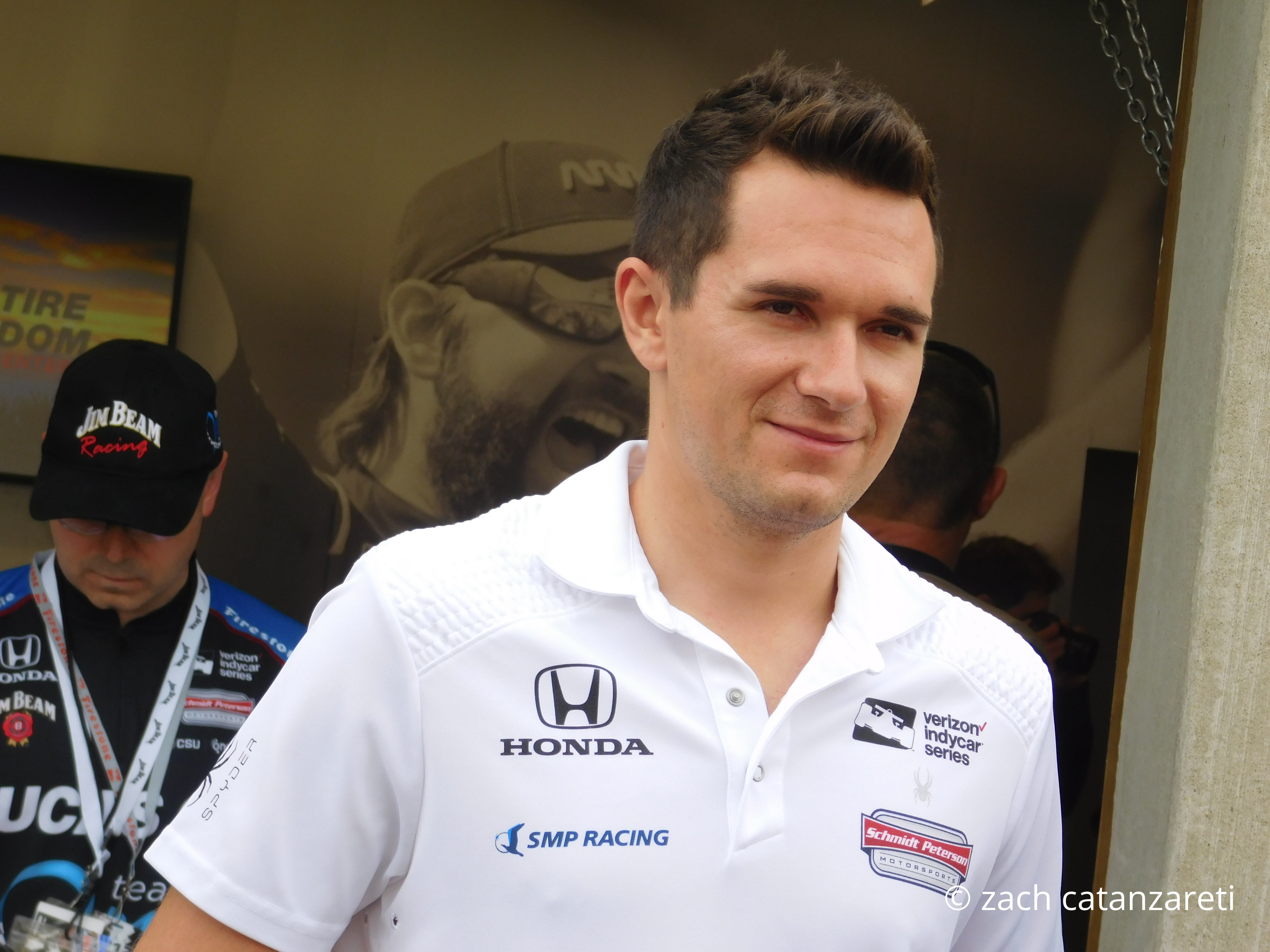 mikhail aleshin